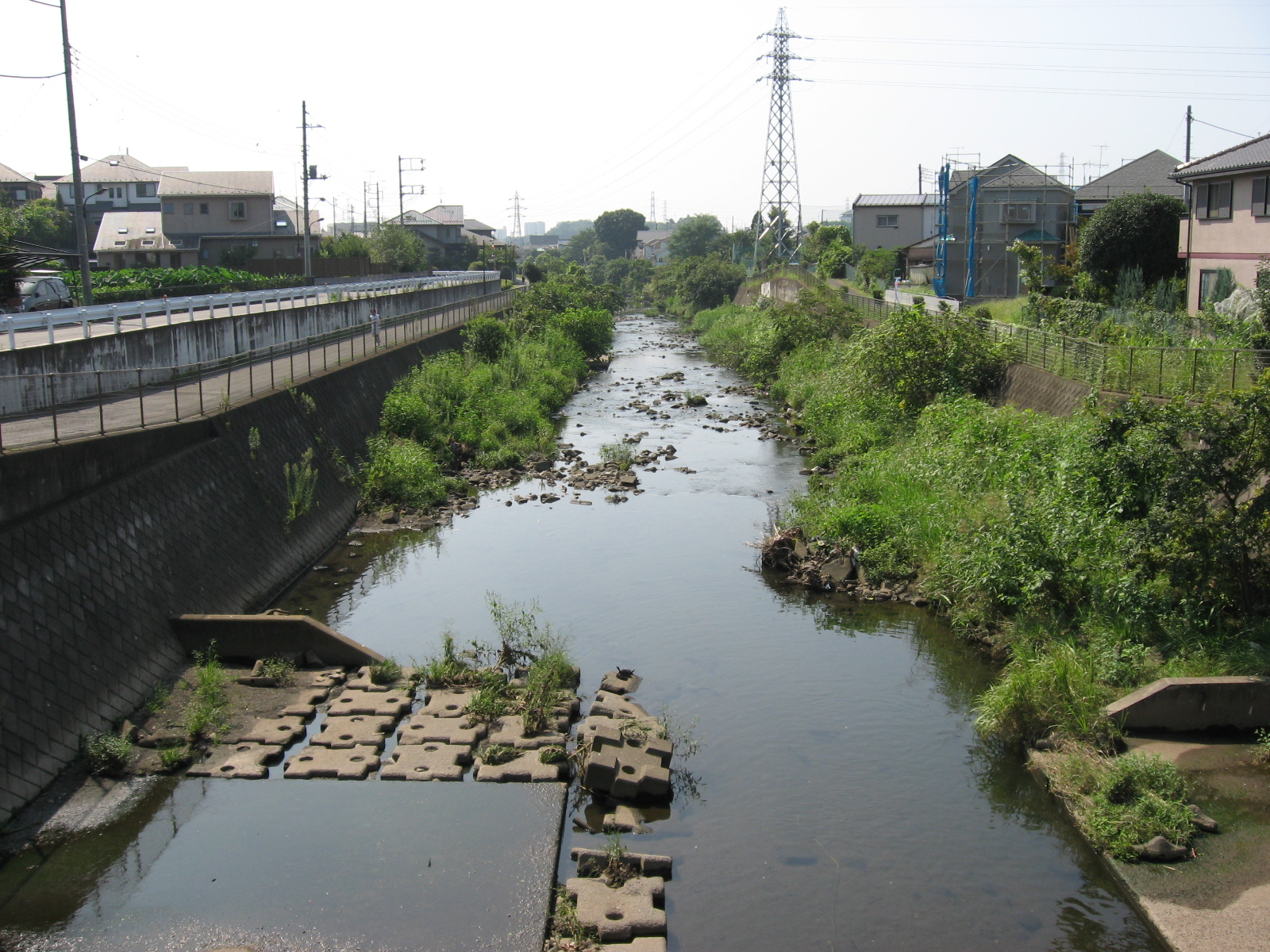 境川